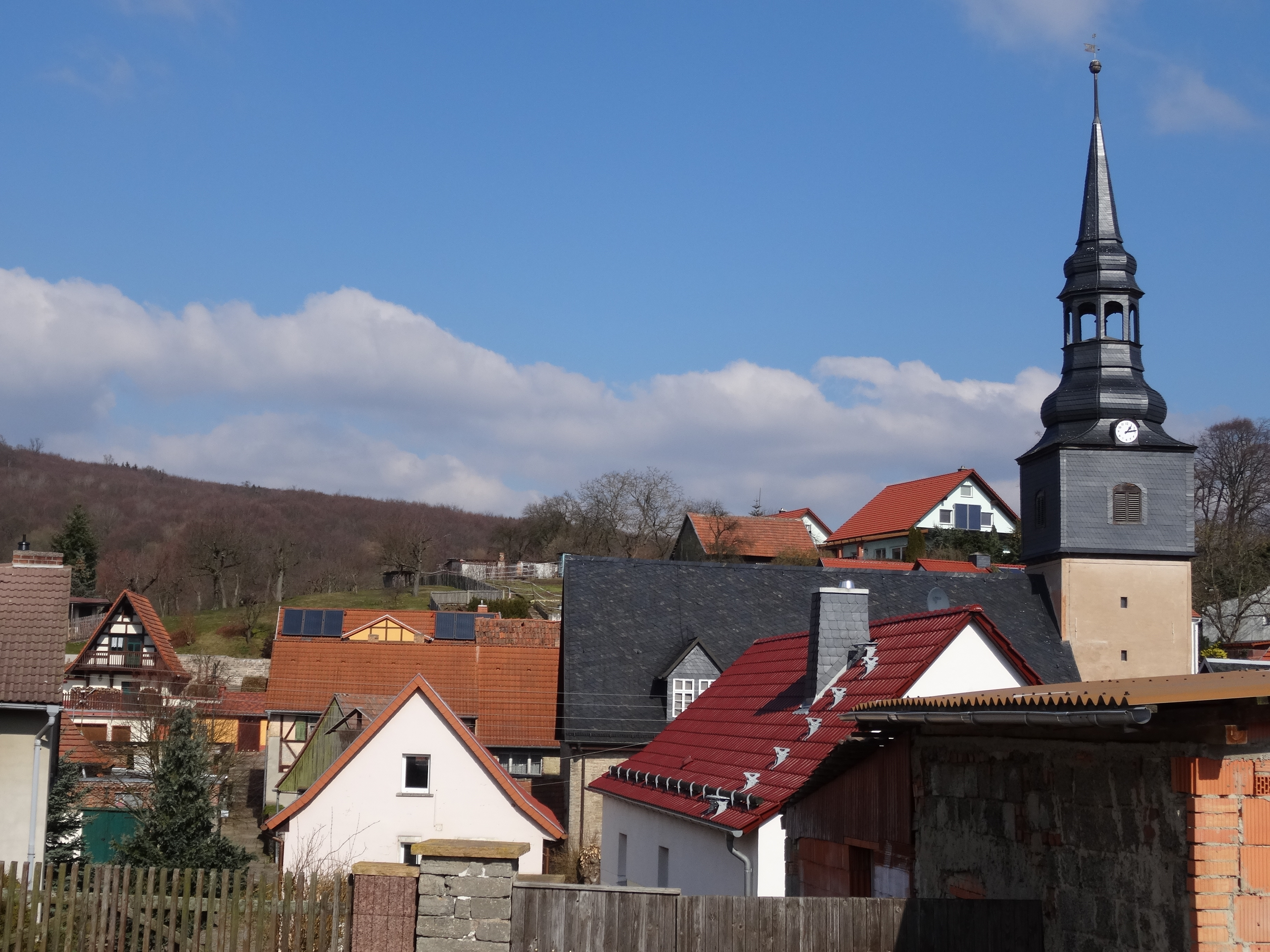 St. Bartholomäus Hainrode (Harz)